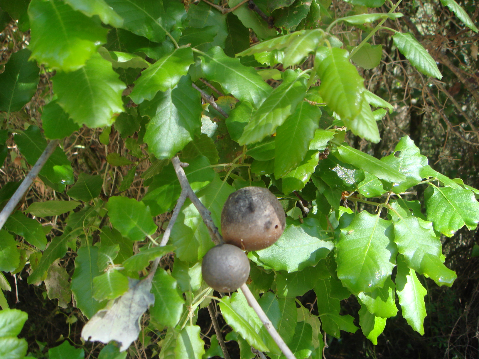 Quercus faginea El Bosque, Cádiz, España